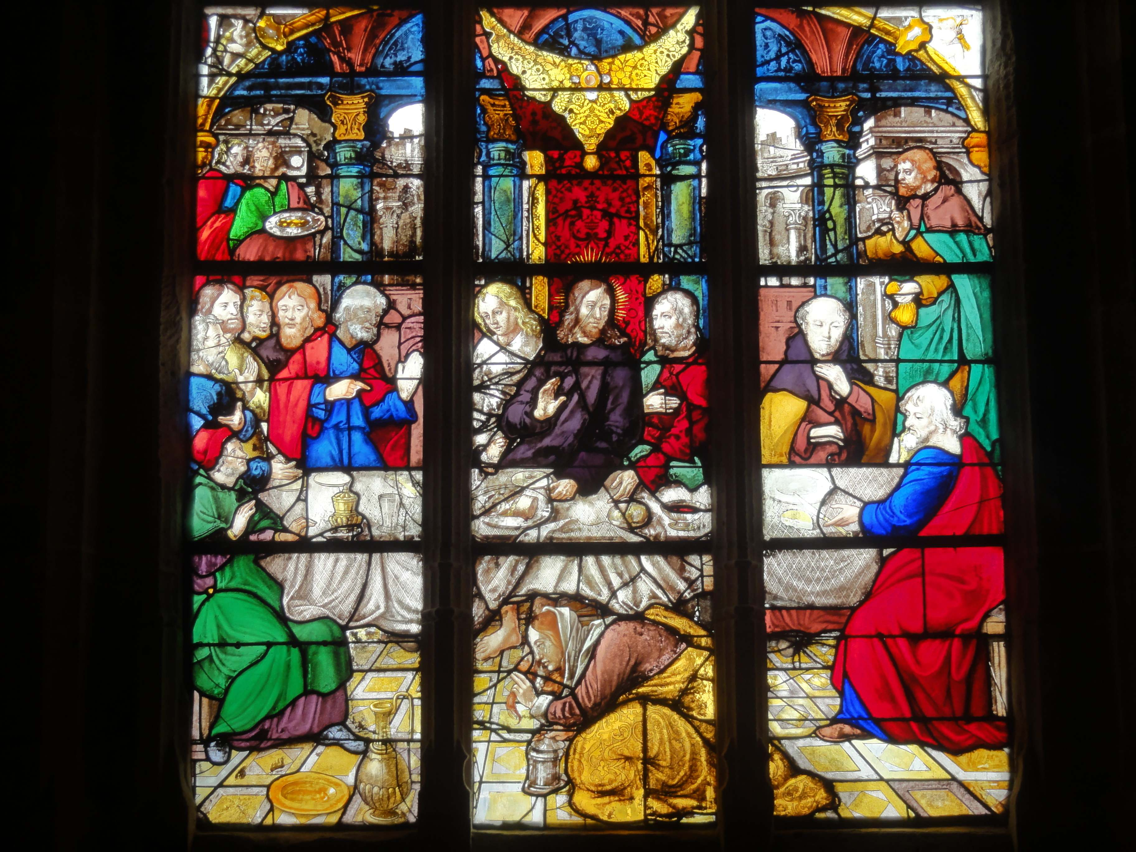 Verrière n° 14, détail.